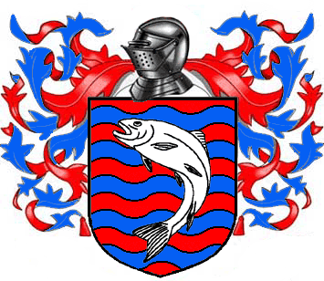 Estandarte creado con photoshop usando material libre o creado ex profeso por mi e inspirado por las obras de Canción de Hielo y Fuego.